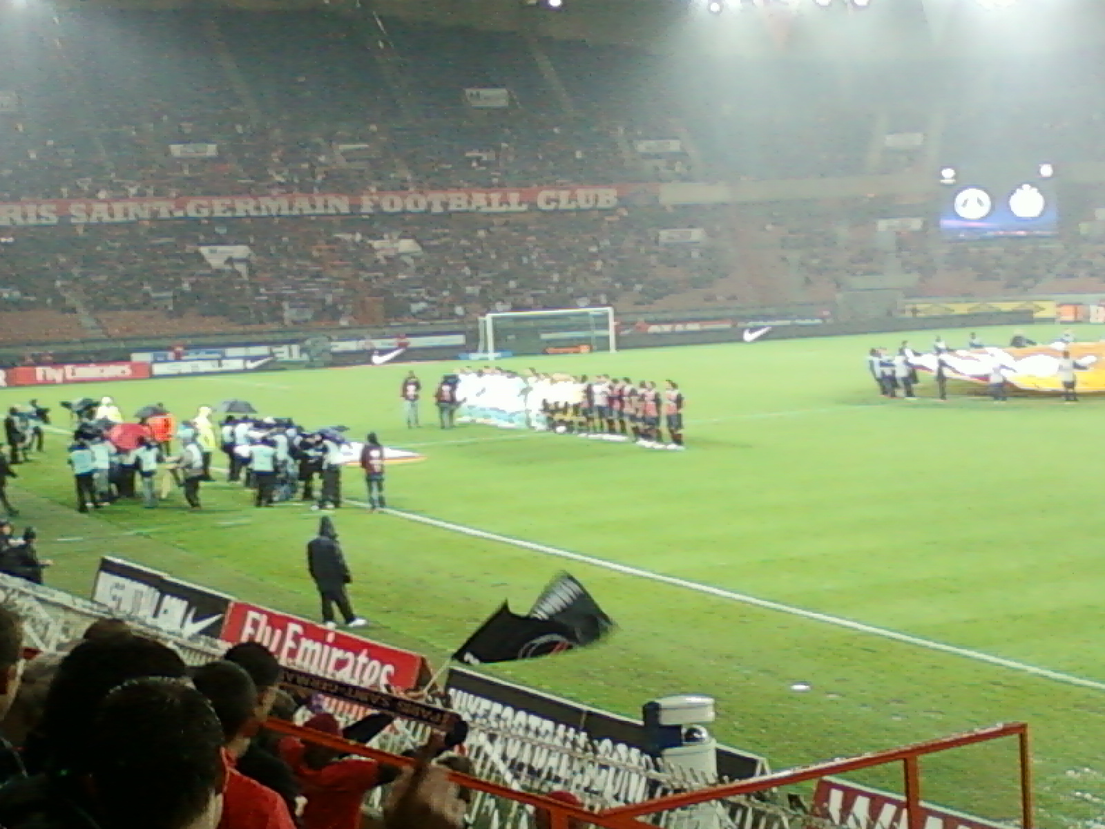 Présentation des équipes lors du match Paris SG - Slovan Bratislava comptant pour la 4ème journée des phases de poules de l'UEFA Europa League du 03 novembre 2011